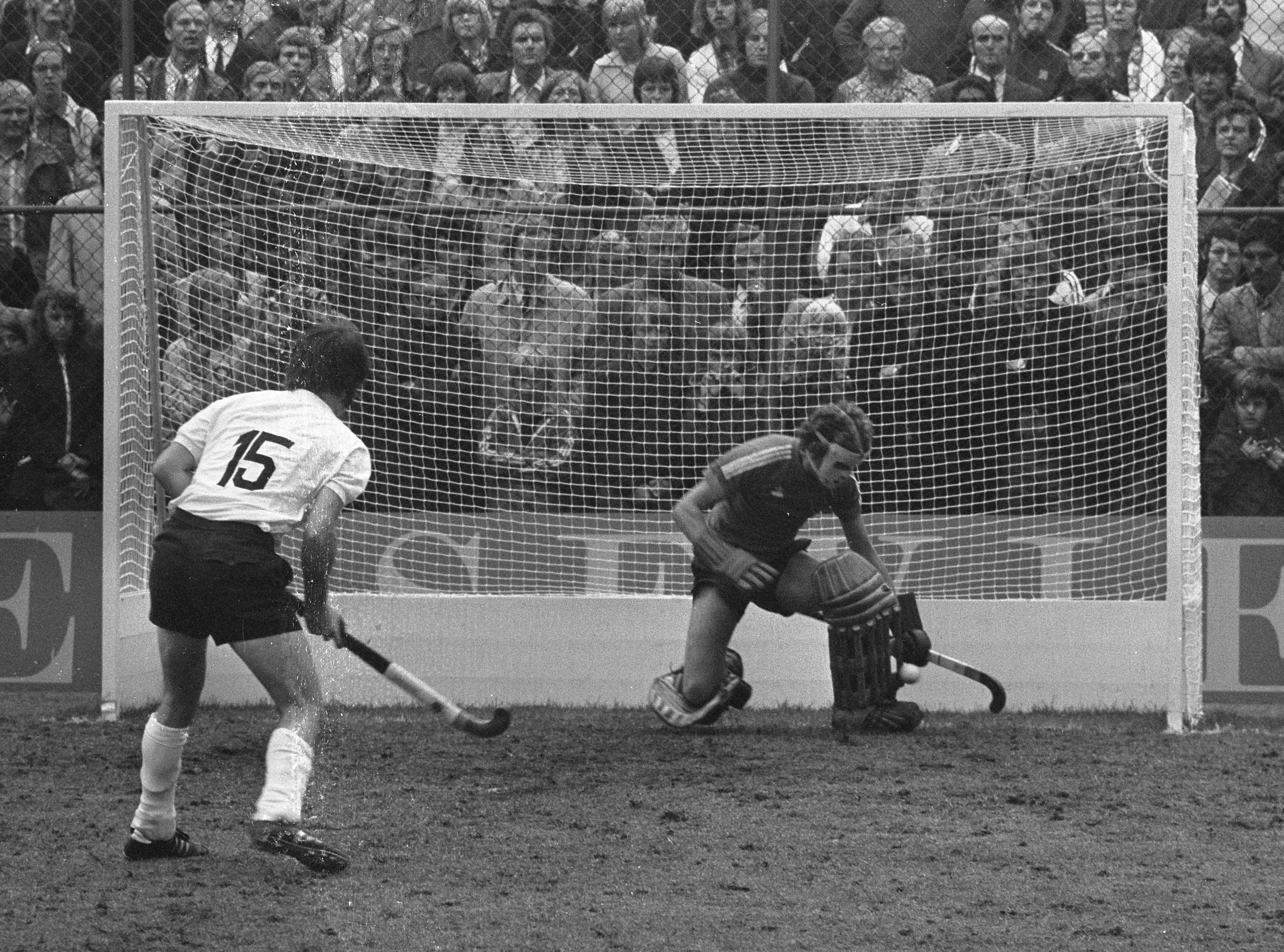 Wereldbeker Hockey, halve finale, Nederland tegen Duitsla 0-0, nummer 8 Maarten Sikking stopt strafbal